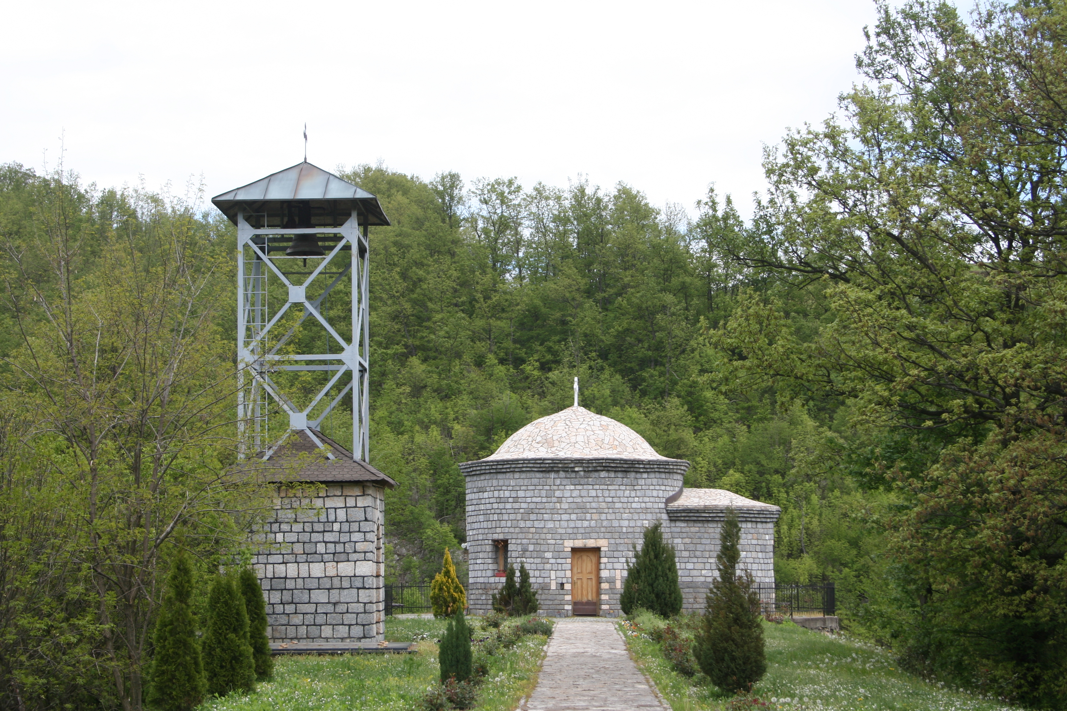 Manastir Bogoštica i Dom Desanke Maksimović